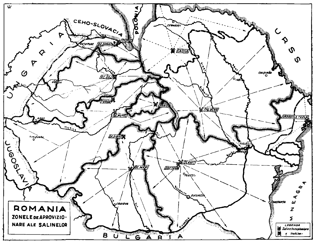 România – zonele de aprovizionare ale salinelor, anii 1938/1939